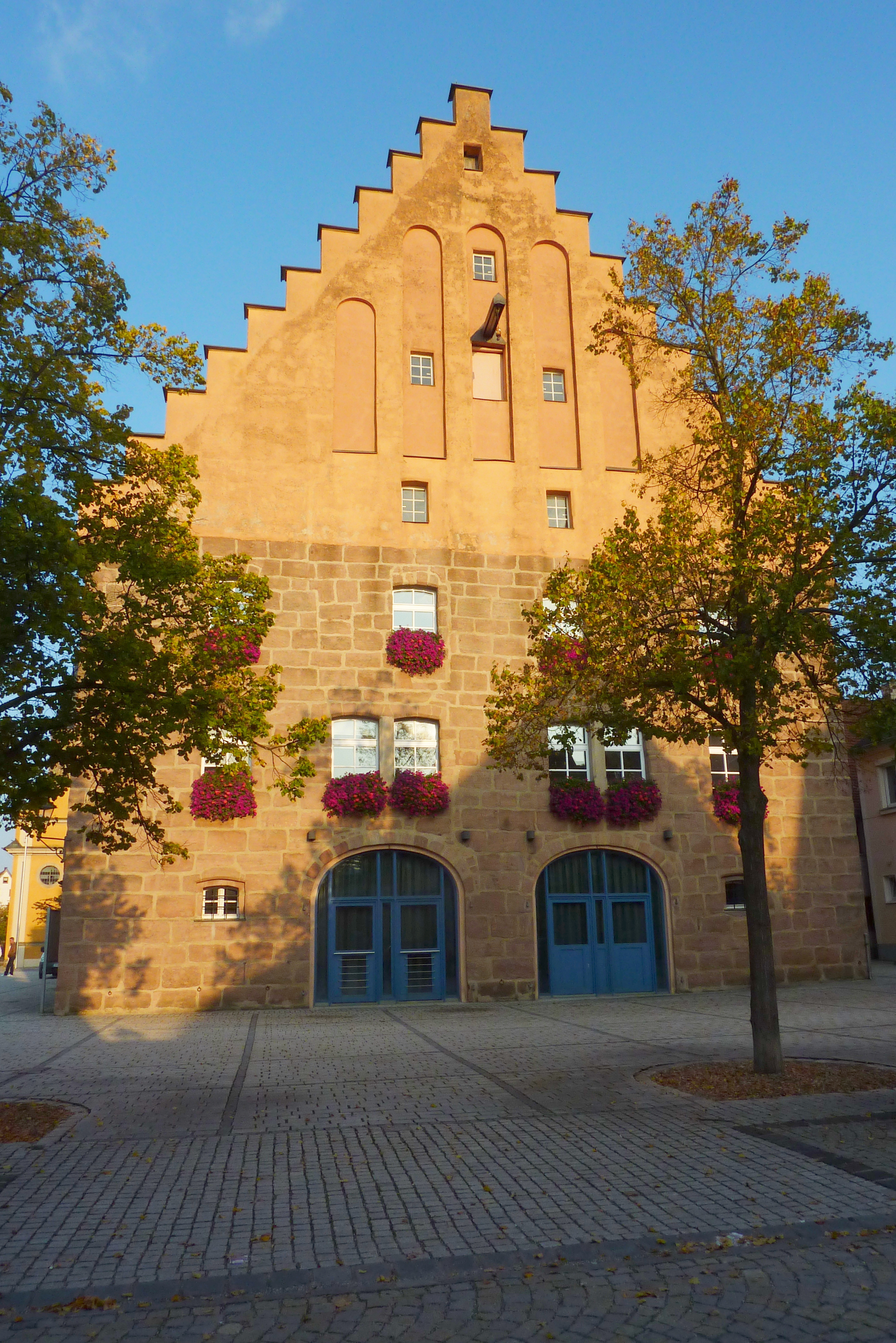 Rathaus in Heideck im Landkreis Roth (Bayern, Deutschland)